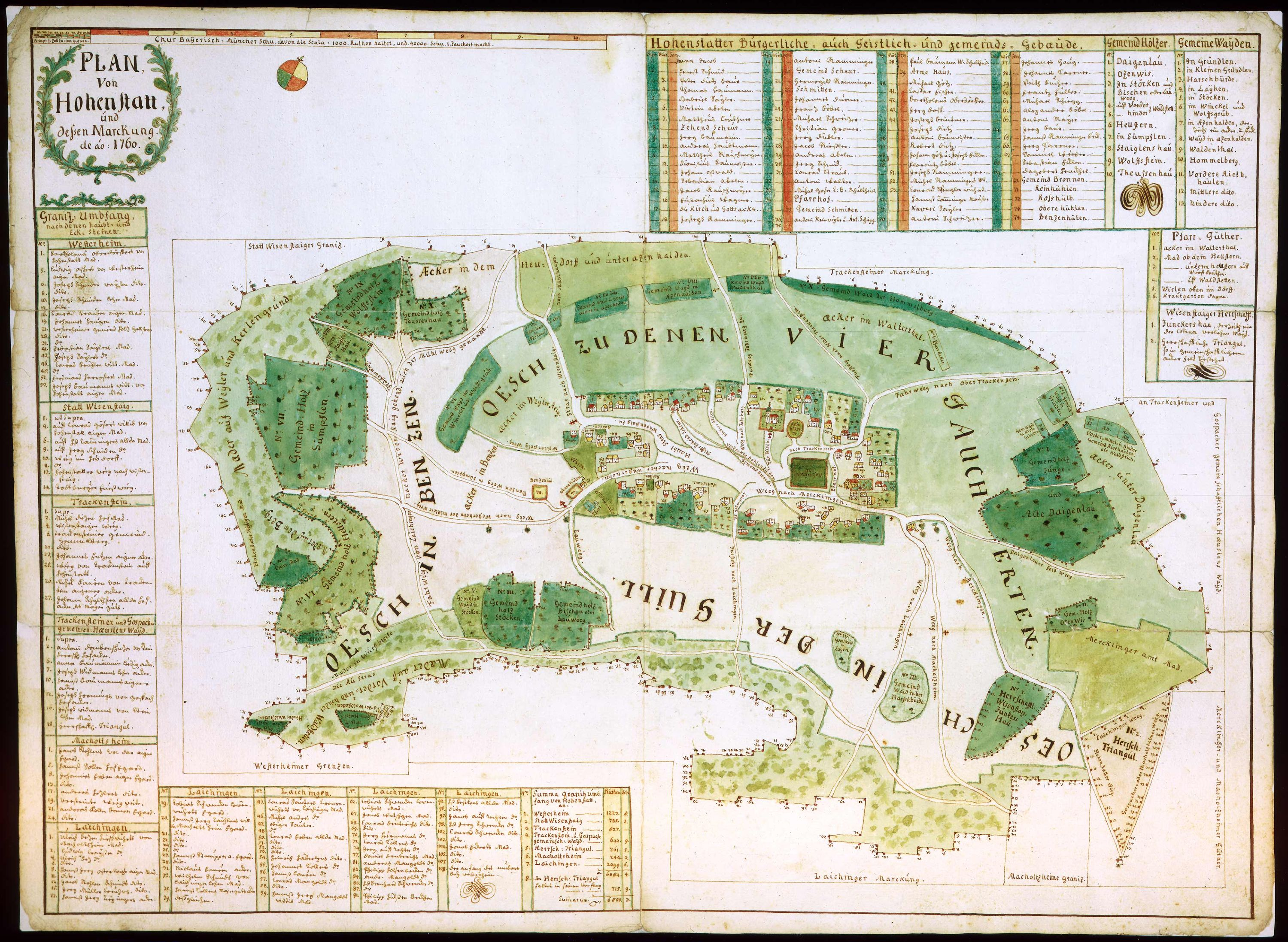 Nach Landesarchiv Baden-Württemberg: "N 11 Nr. 188 "Plan von Hohenstadt und dessen Marckung" nummerierte Gebäude von Hohenstadt (in naiven Ansichten, die Häuser südlich des Weges nach Merklingen "auf dem Kopf stehend"), Gemarkungsgrenze von Hohenstadt mit nummerierten Grenzsteinen / Kulturarten (Gemeinde- und Herrschaftswälder mit teils nummerierten Grenzsteinen, Gemeindeweiden) / Waldnamen, vereinzelte Flurnamen / Aufstellungen der nummerierten Gebäude (eingeteilt nach bayerischem, württembergischem Besitz oder Gemeindebesitz) und der Hohenstädter Gemeindewälder und -weiden, Pfarrgüter und Wiesensteiger Herrschaftsgüter am oberen Kartenrand; Grenzbeschreibung mit Namen der Anrainer an die Hohenstädter Gemarkungsgrenze (auf den Gemarkungen von Drackenstein, Gosbach, Laichingen, Machtolsheim, Westerheim und Wiesensteig) am linken und unteren Kartenrand / farbiger Kompass, ein Münchner Schuh zu 10 Zoll (= 29,2 cm) in Originalgröße am oberen Kartenrand Format: 44,5 x 61 cm"